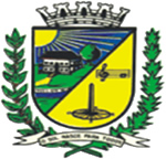 Brasão de Armas do município de Quinta do Sol, Paraná, Brasil.